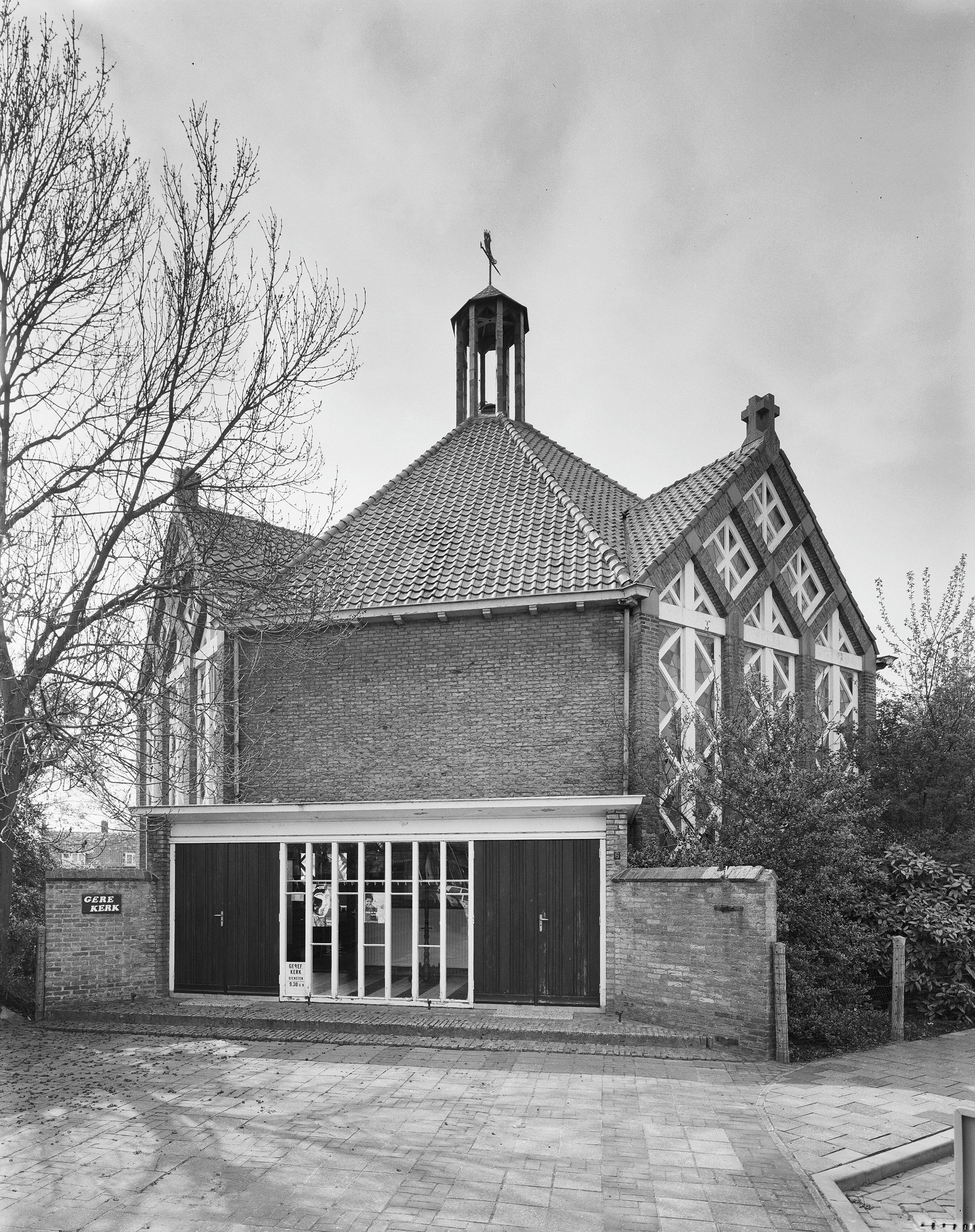 Gereformeerde Kerk: Overzicht westgevel (opmerking: Gefotografeerd voor Monumenten In Nederland Zeeland, bladzijde 195)